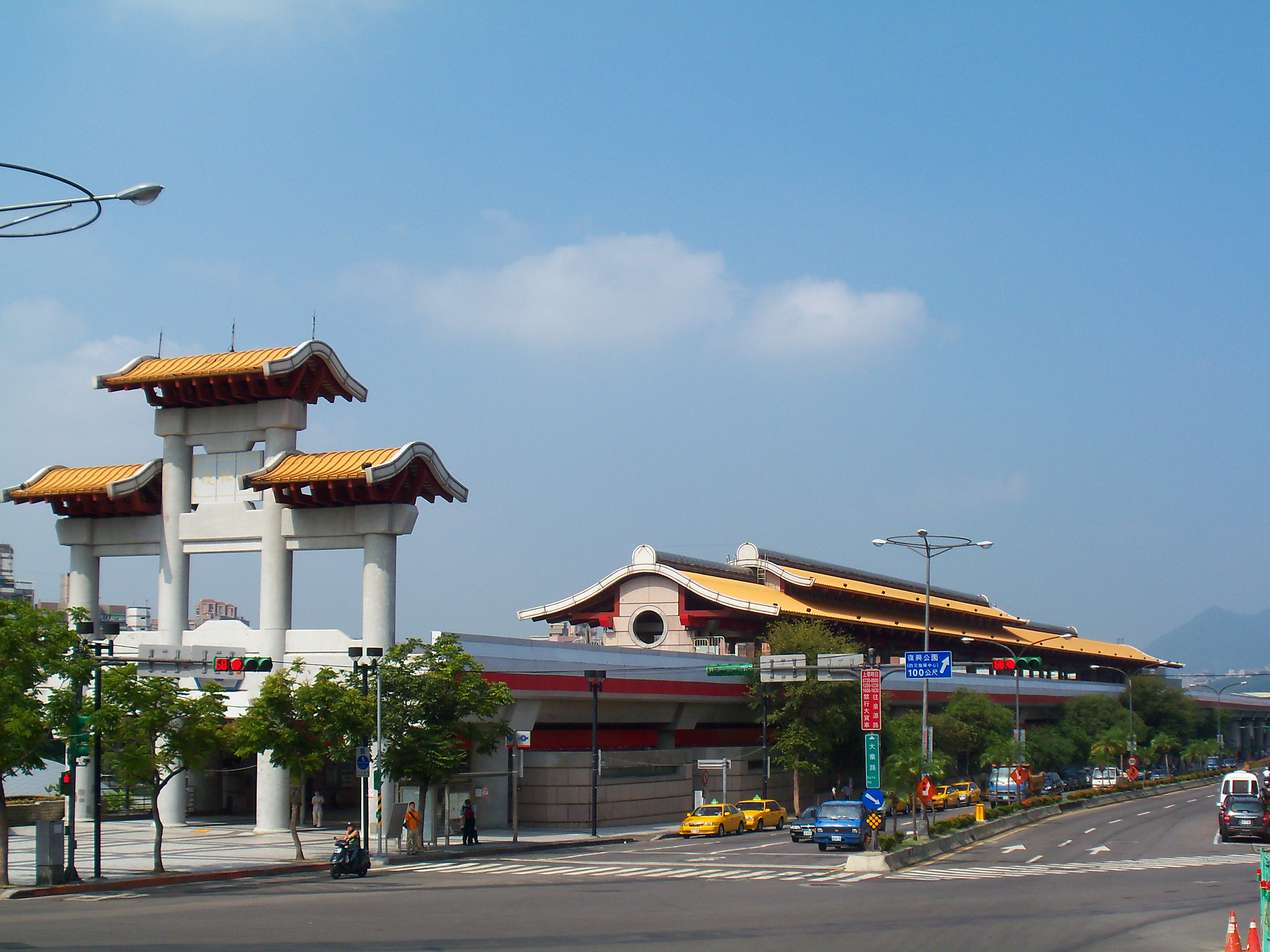 台北捷運新北投支線新北投駅。